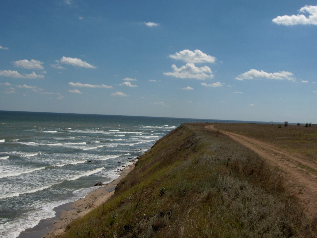 Szakadópart Costinesti mellett.(Románia, löszfal)